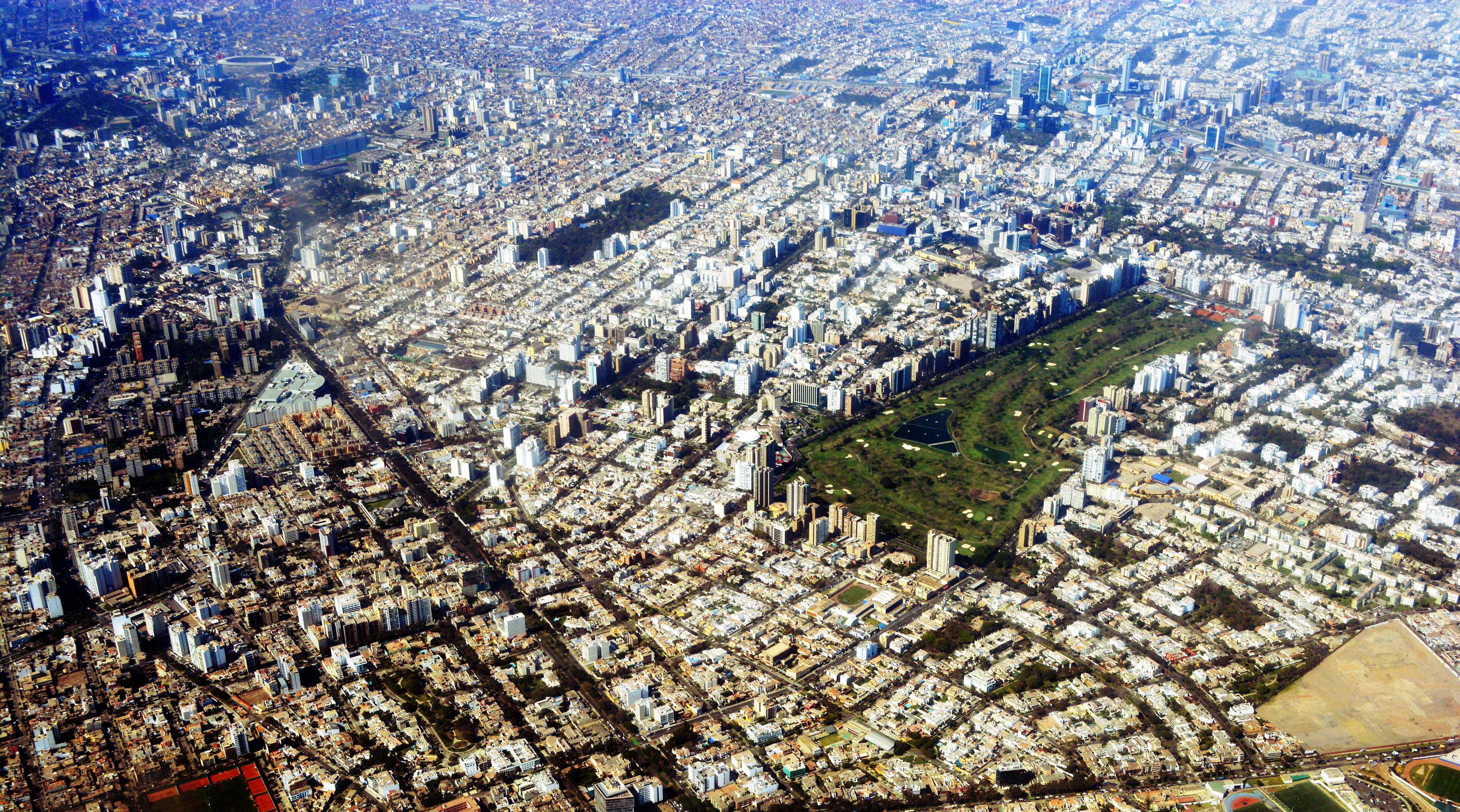 Fotografía aérea del sur de la ciudad de Lima